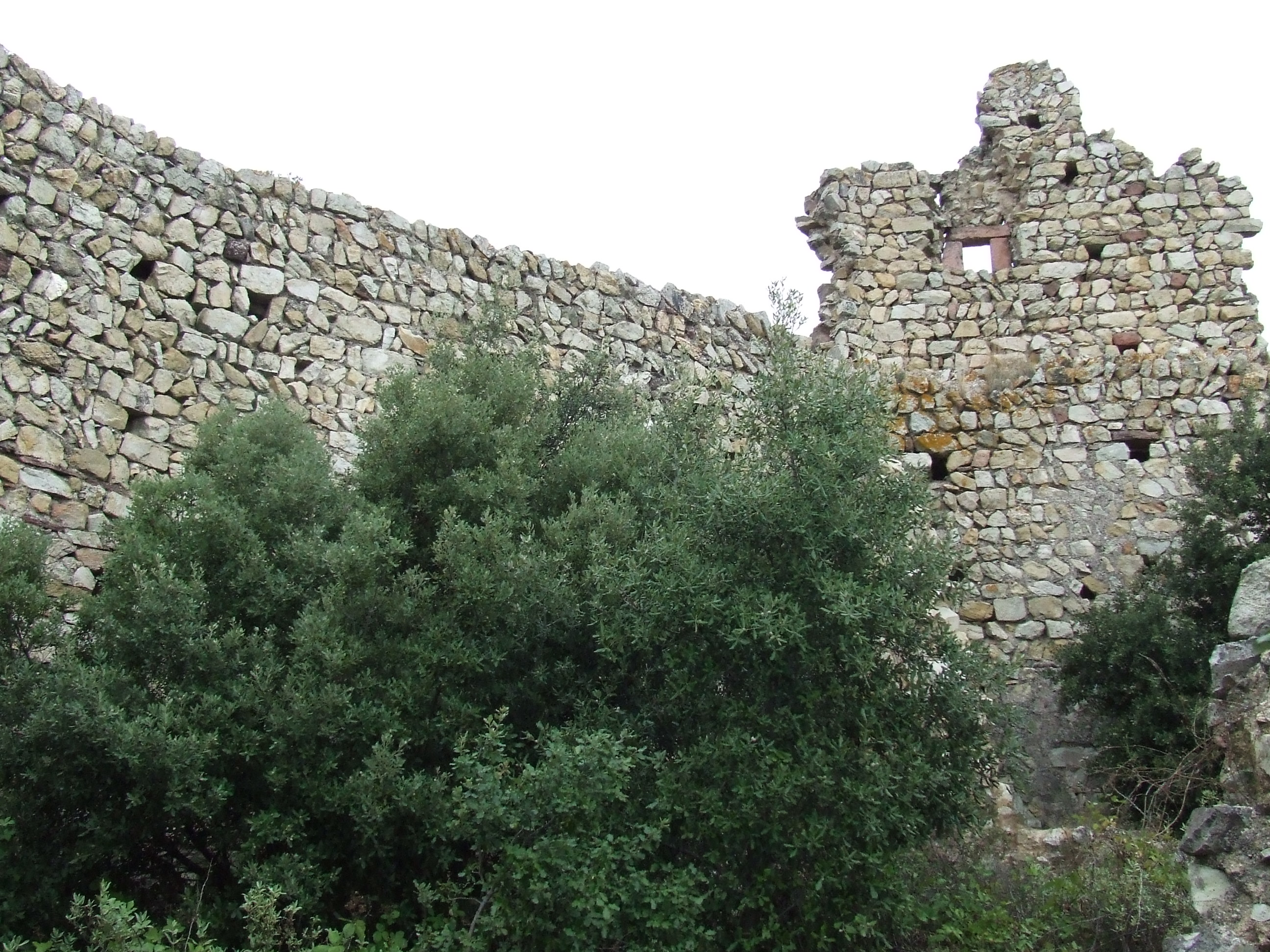 Castell de Montbui (Bigues, Bigues i Riells, Vallès Oriental)